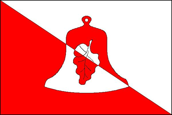 Vlajka obce Rašov